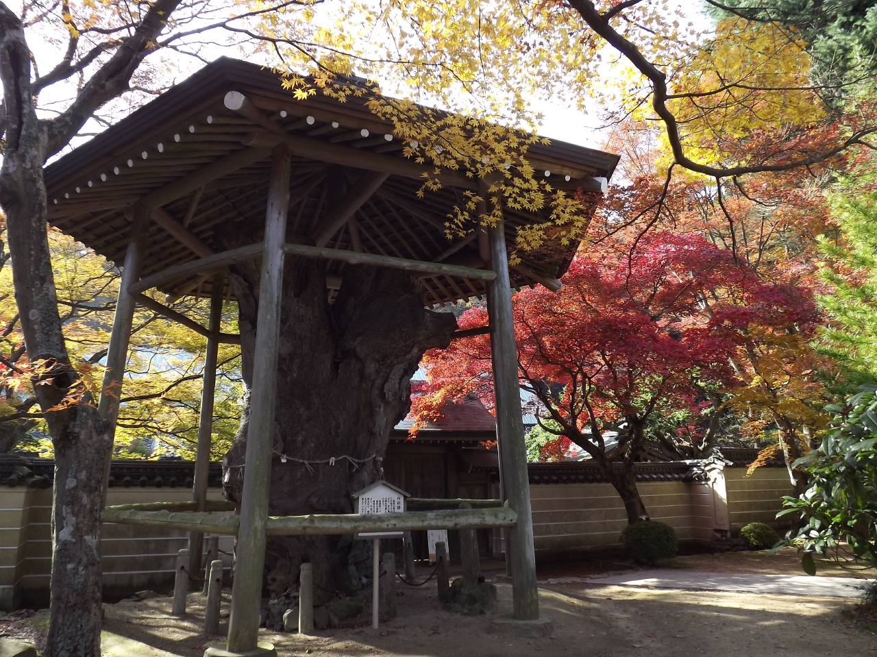 根香寺のハッコウケヤキ